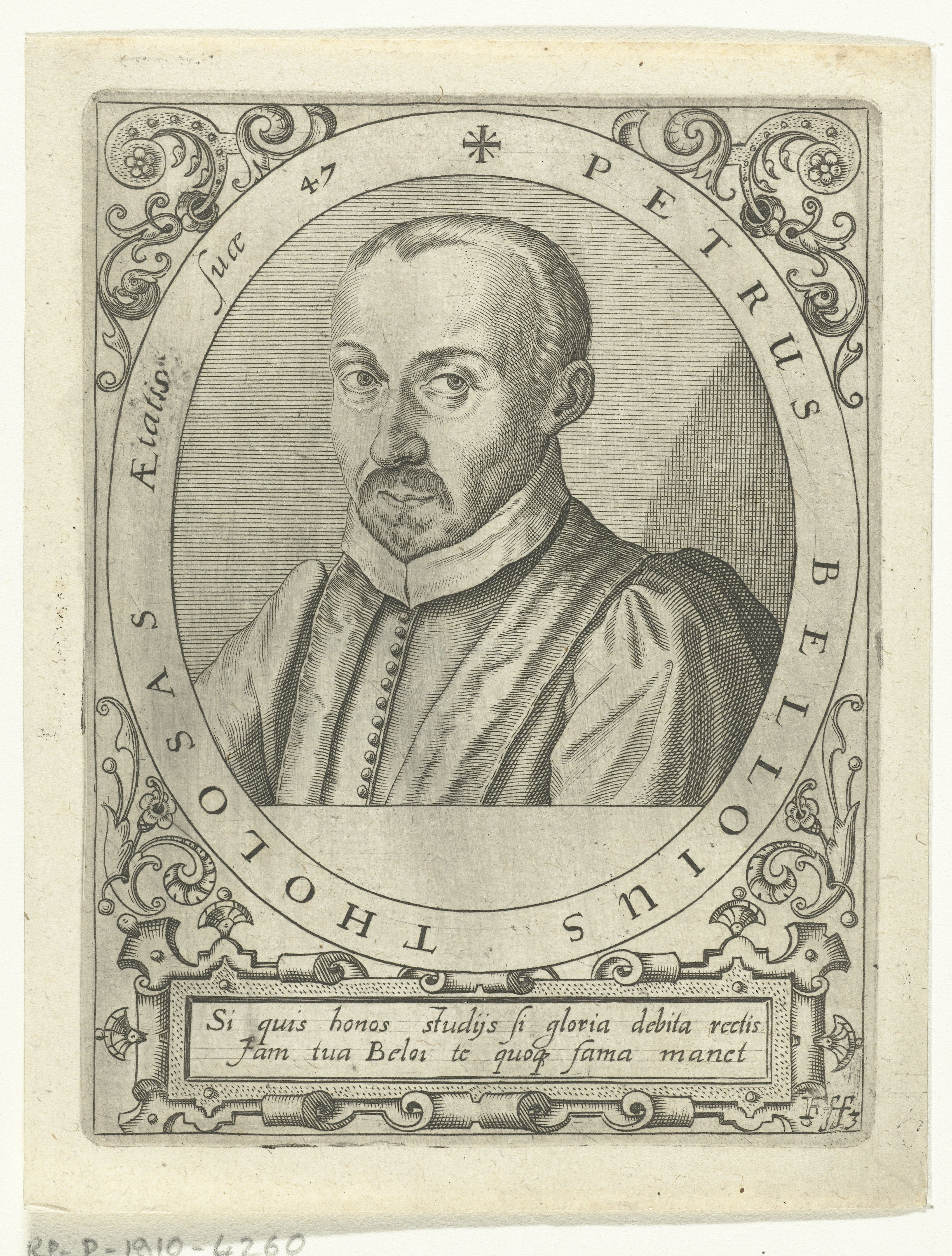 IdentificatieTitel(s): Portret van Pierre de Belloy op 47-jarige leeftijdPetrus Belloius Tholosas (titel op object)Objecttype: prent boekillustratie Objectnummer: RP-P-1910-4260Catalogusreferentie: Singer 6258Opschriften / Merken: verzamelaarsmerk, verso, gestempeld: Lugt 2228Omschrijving: Portret van de Franse auteur Pierre de Belloy, in ovaal met randschrift. Onder het portret een cartouche met Latijnse tekst.VervaardigingVervaardiger: prentmaker: Cornelis Galle (I)naar ontwerp van: Jean Jacques Boissard (mogelijk)Plaats vervaardiging: onbekendDatering: ca. 1597 - ca. 1599 en/of 1669Fysieke kenmerken: gravureMateriaal: papier Techniek: graveren (drukprocedé)Afmetingen: plaatrand: h 140 mm × b 100 mmToelichtingGemaakt voor: J.J. Boissard, Icones virorum illustrium doctrina &c eruditione praestanti um contines. Frankfurt am Main: de Bry, 1597-1599. Opnieuw gebruikt in: J.J.Boissard, Bibliotheca chalcographica, hoc est Virtute et eruditione clarorum Virorum Imagines. Heidelberg: Clemens Ammon, 1669. Dl. 1-5 (te herkennen aan de toegevoegde signatuur in de rechter onderhoek: 3F3).OnderwerpWie: Pierre de BelloyVerwerving en rechtenVerwerving: aankoop 1905Copyright: Publiek domein